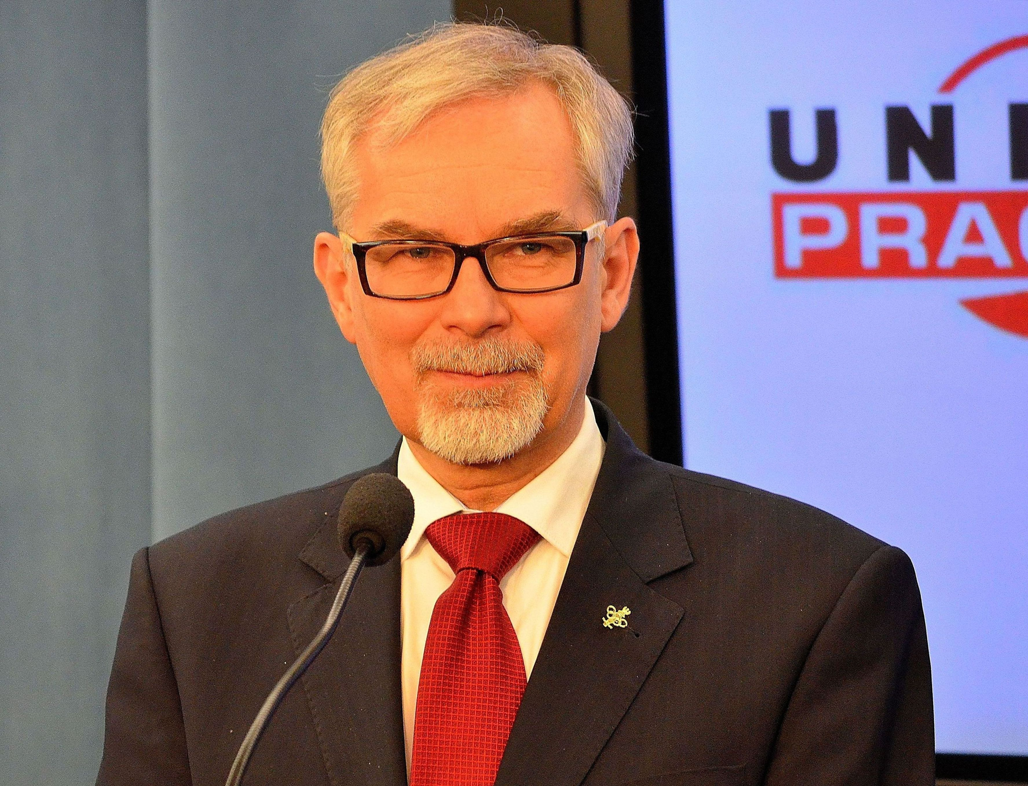 Waldemar Witkowski